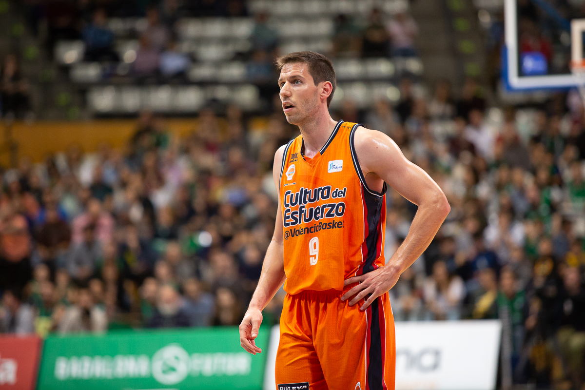 Sam Van Rossom, jugador del Valencia Básquet, en un partido de la temporada 2017-18